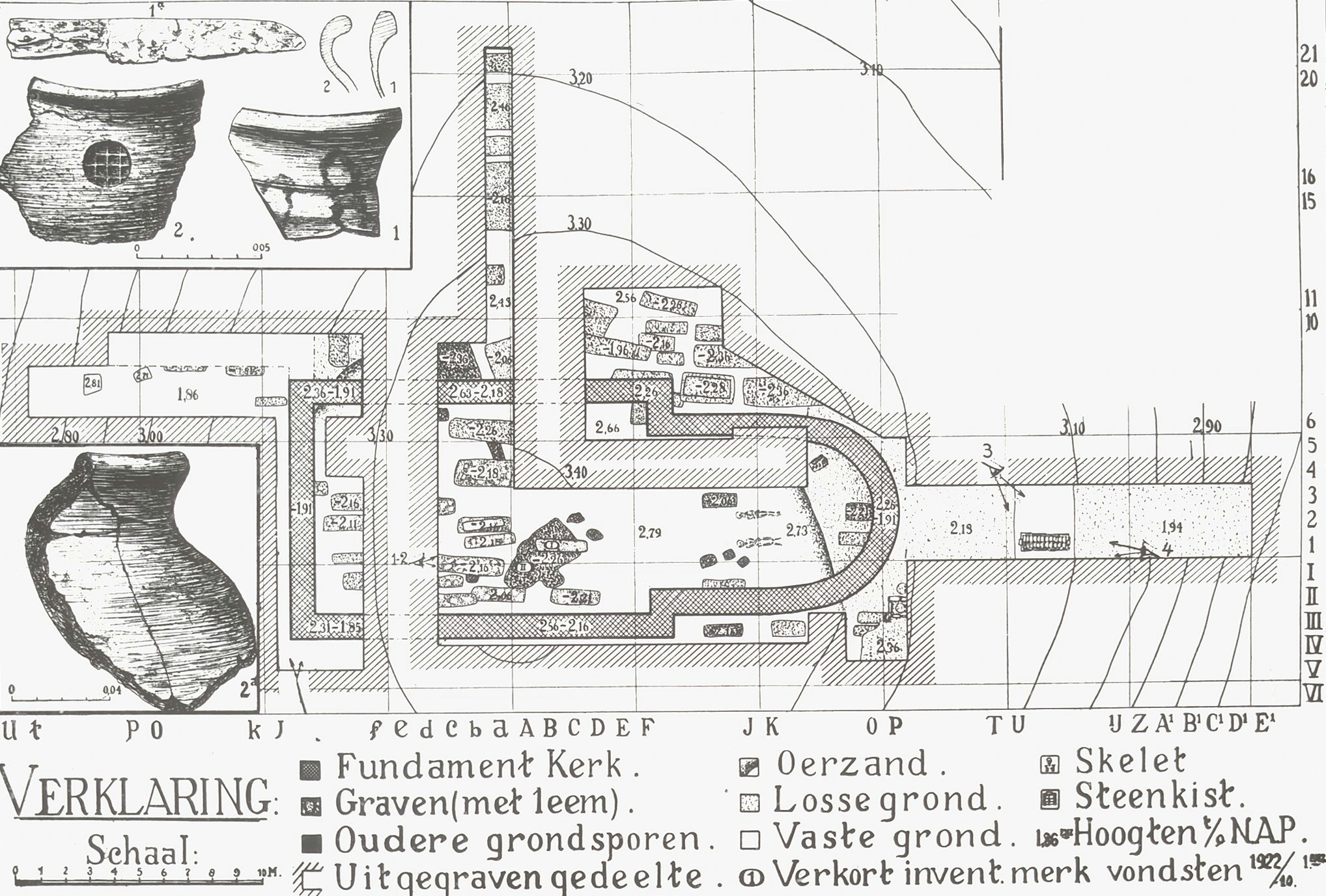 KLOOSTER: Exterieur TEKENING VAN OPGRAVINGEN, DETAILS